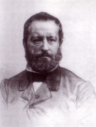 Portrait of Wouterus Verschuur